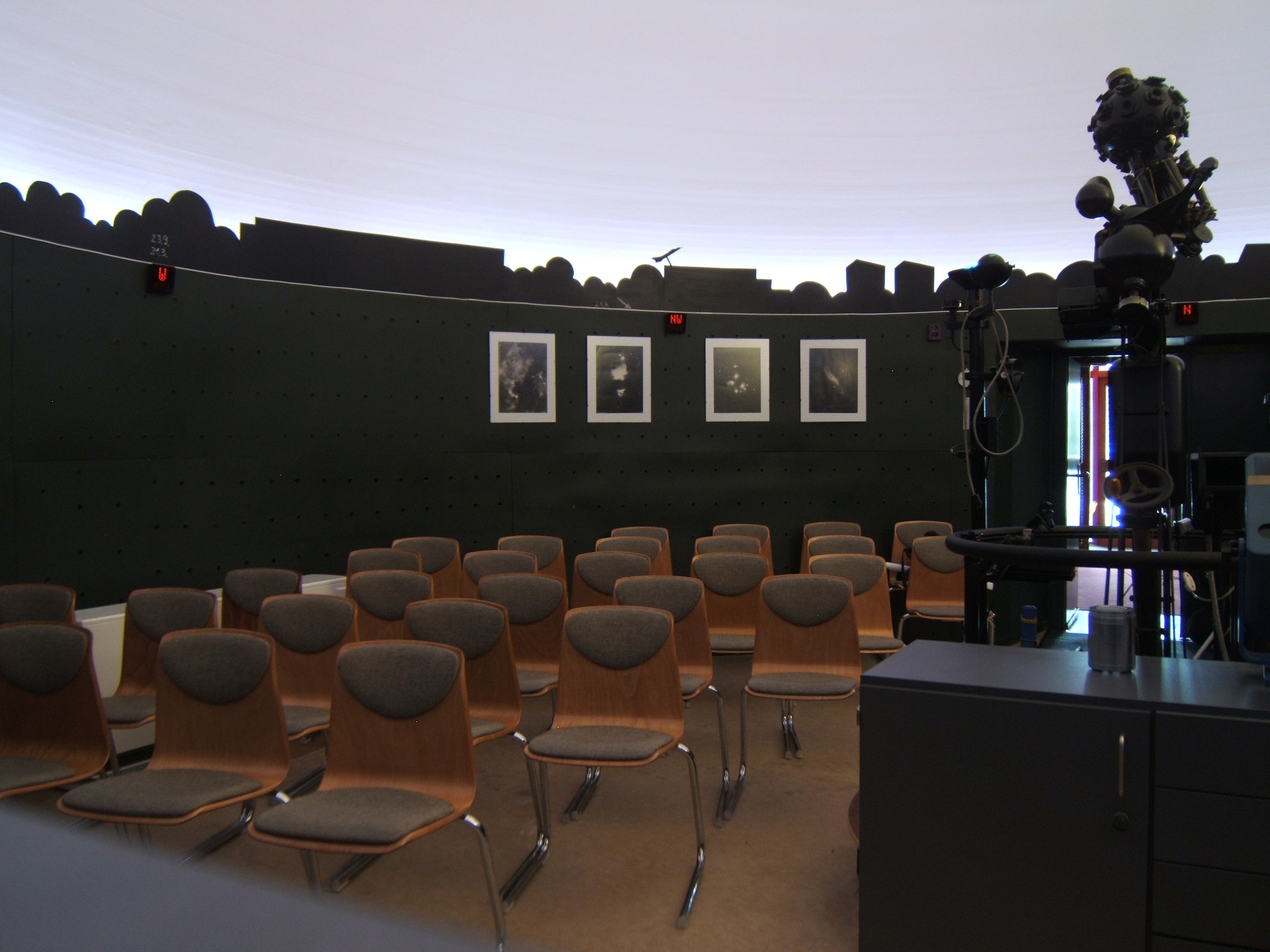 Blick in des Kuppelsaal des Planetarium Merseburg